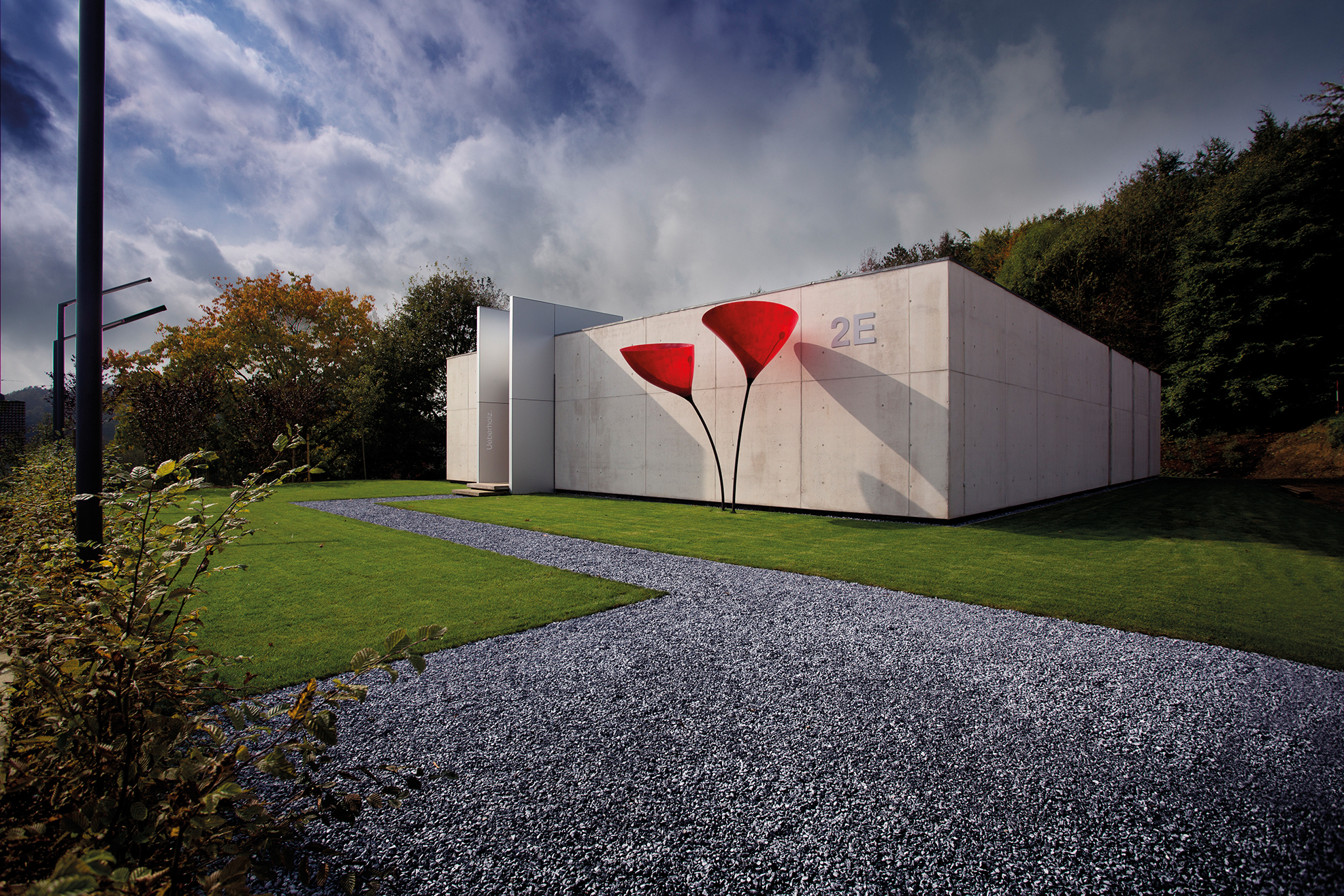 Bürogebäude in Wuppertal – Vorm Eichholz 2e